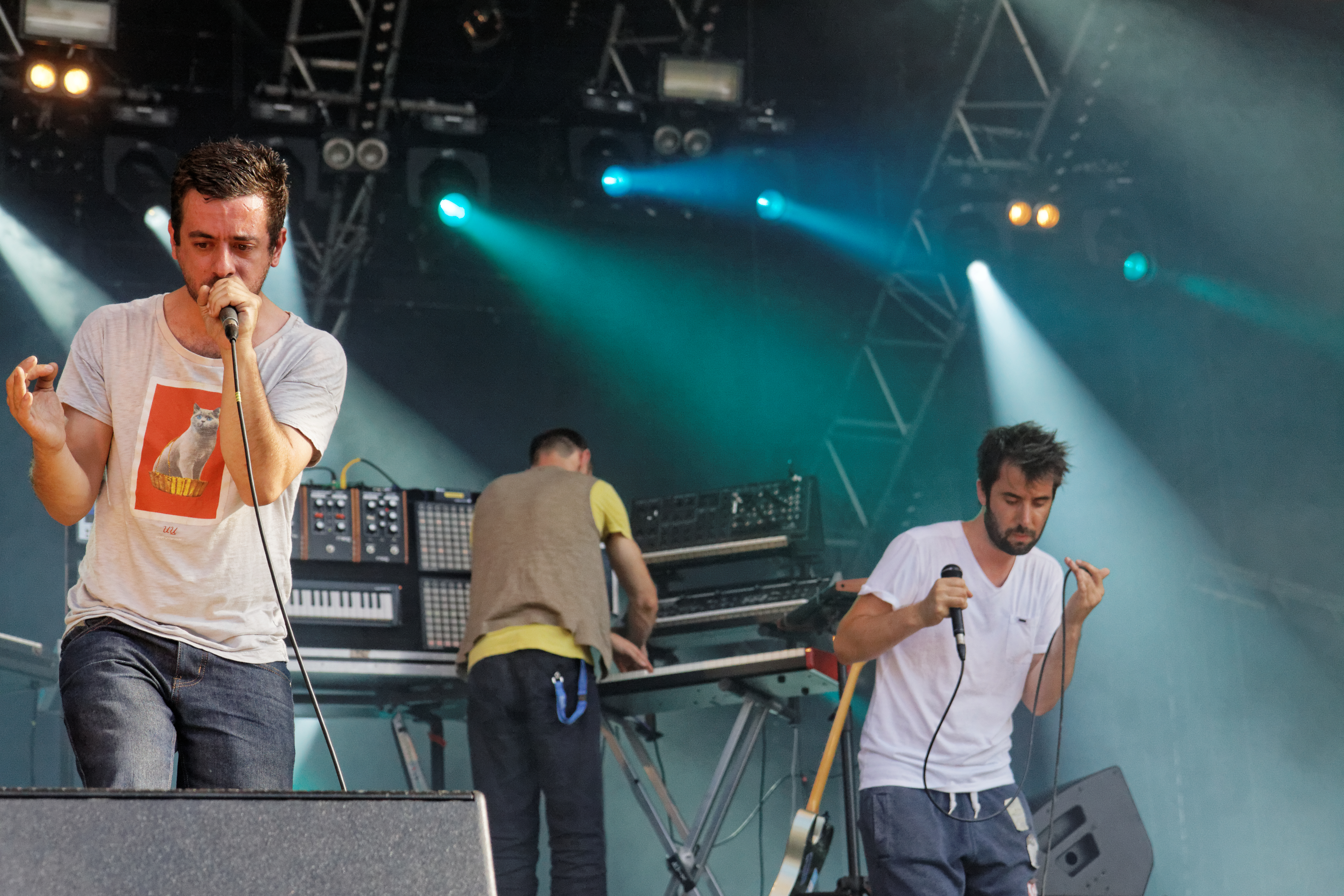 Odezenne en concert sur la scène Grall lors du festival des Vieilles Charrues 2014.